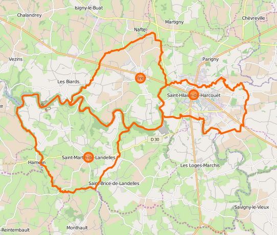 Carte de la commune nouvelle et ses communes déléguées